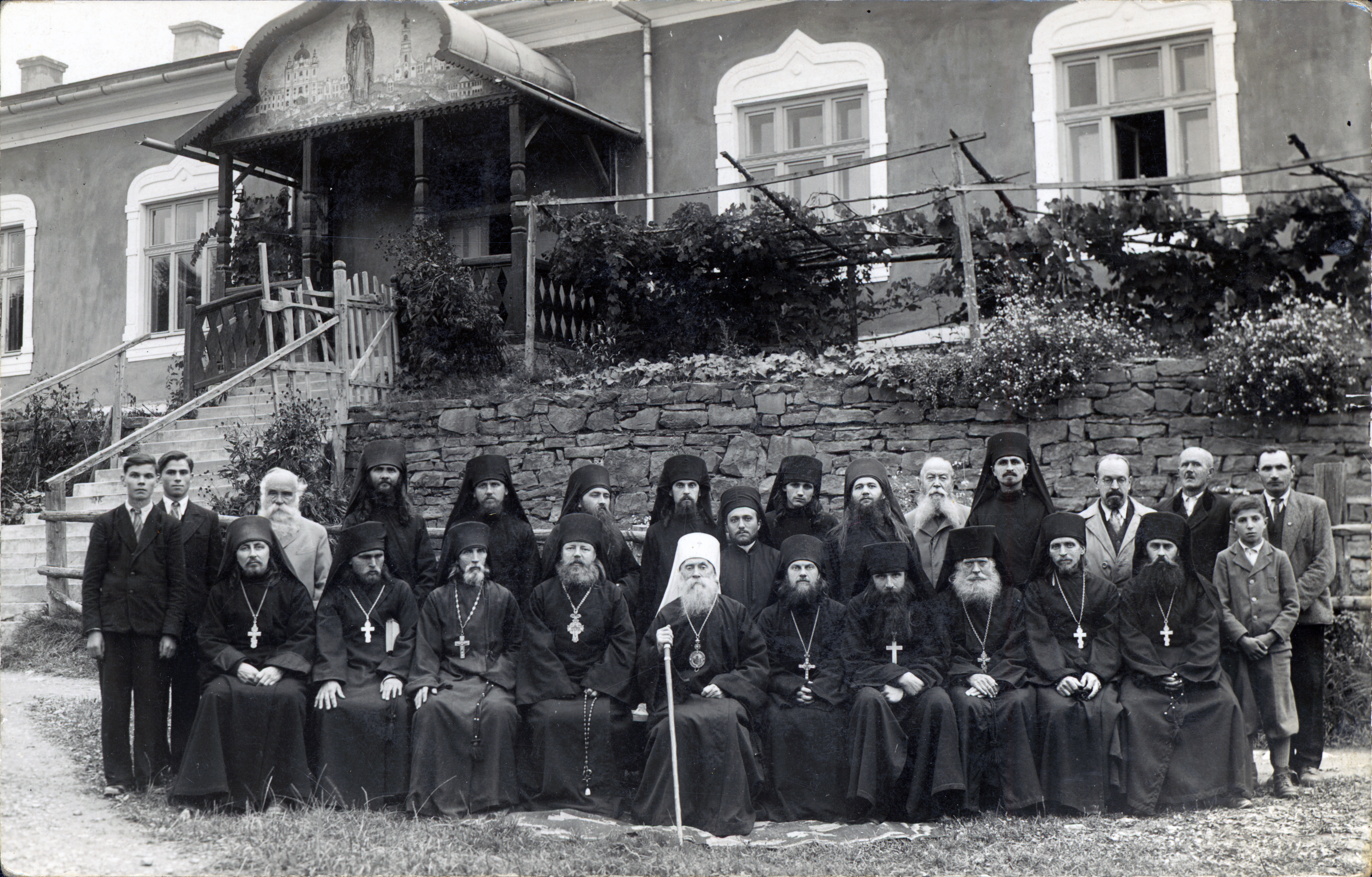 Посещение митрополитом Анастасием преподобного Иова Почаевского. Ладомирова. В первом ряду, крайний справа – 12-летний Василий Шкурла, будущий Митрополит Лавр. 1940 г.